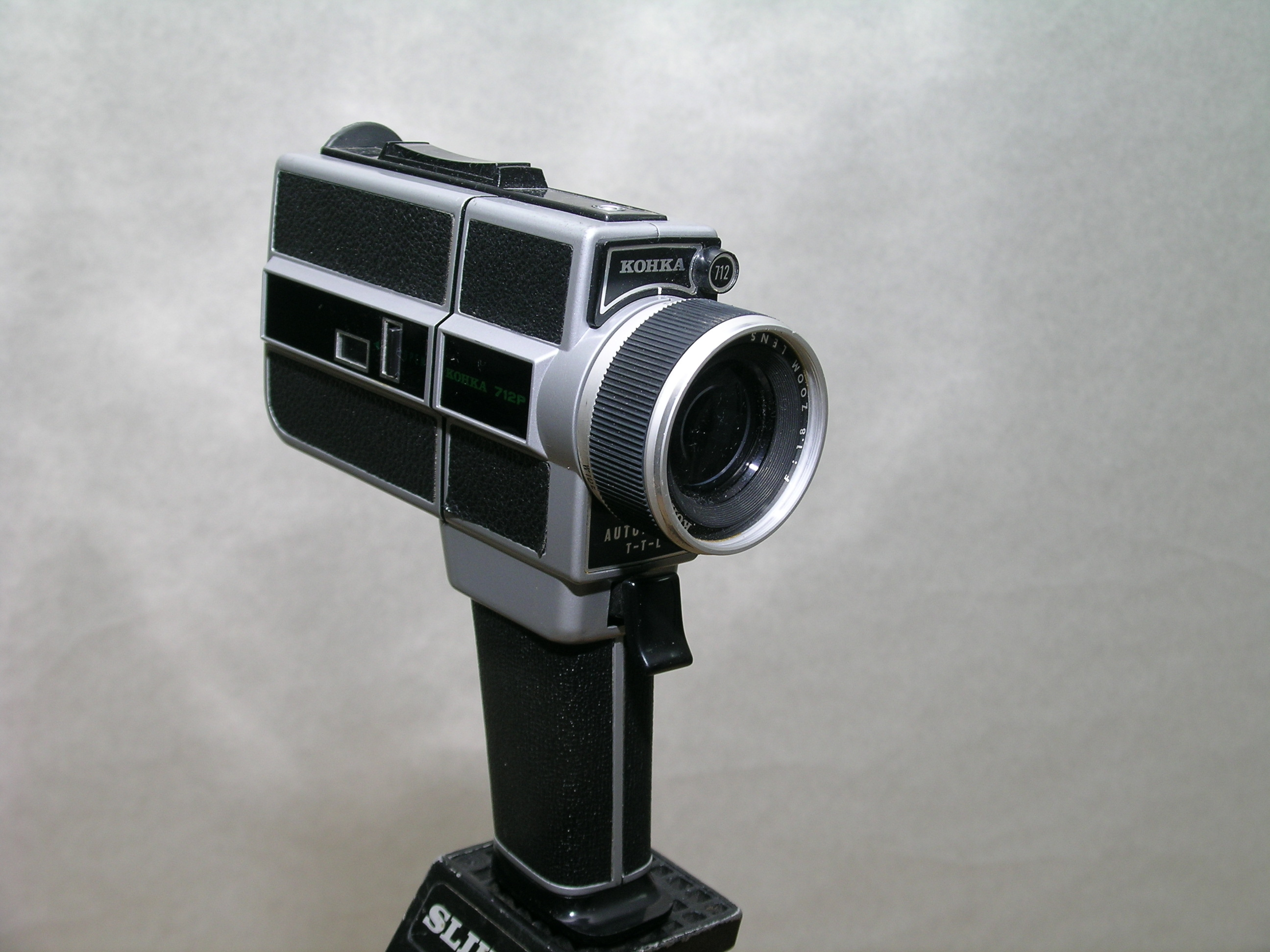 Cámara de Súper 8 (colección de Jesús L. Cuenca)